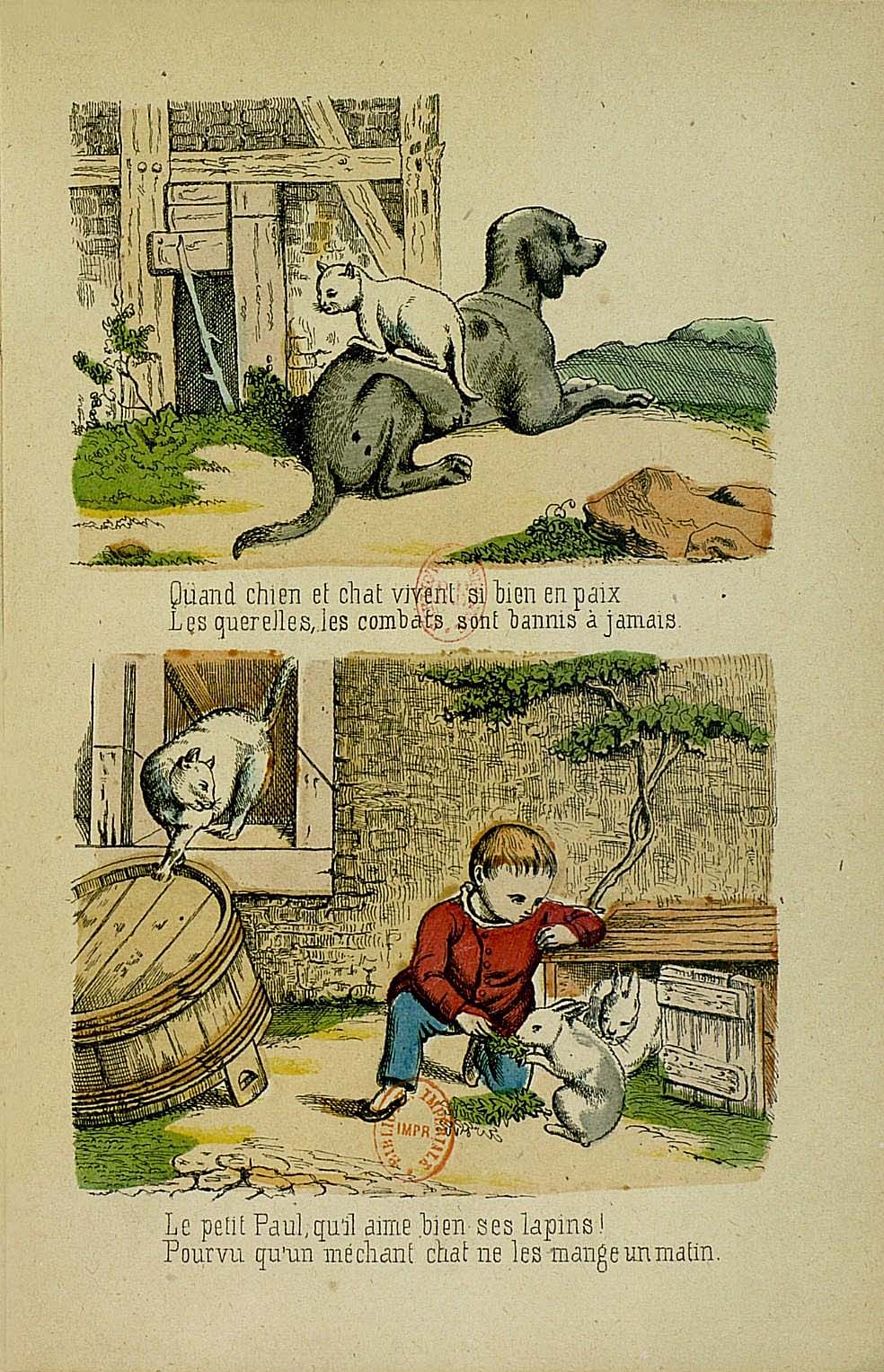 Planche de Lectures illustrées de l'enfance, lith. de Fr. Wentzel à Wissembourg. Dépôt chez Vve Humbert, Paris, 1860